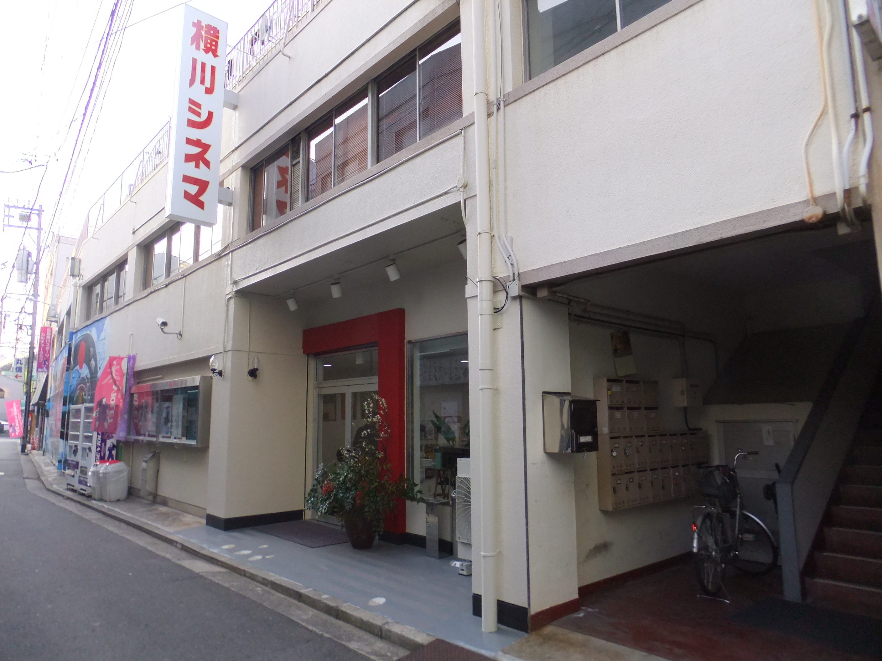 広島市の映画館、横川シネマ!!